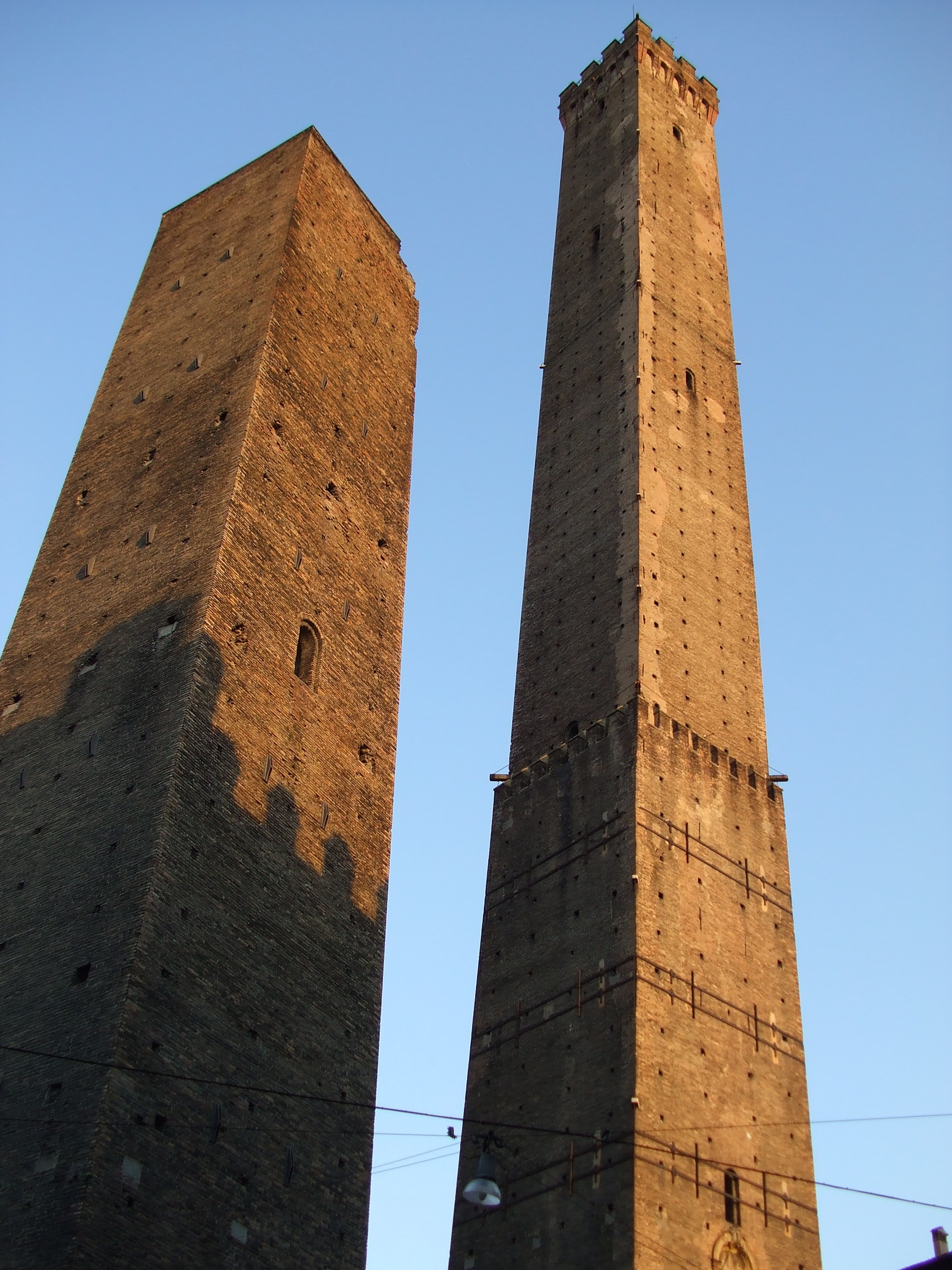 Las Dos Torres de Bolonia, Italia